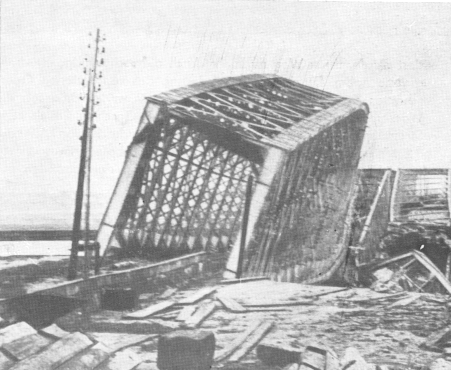 Riesa Elbebrücke nach Einsturz 1876